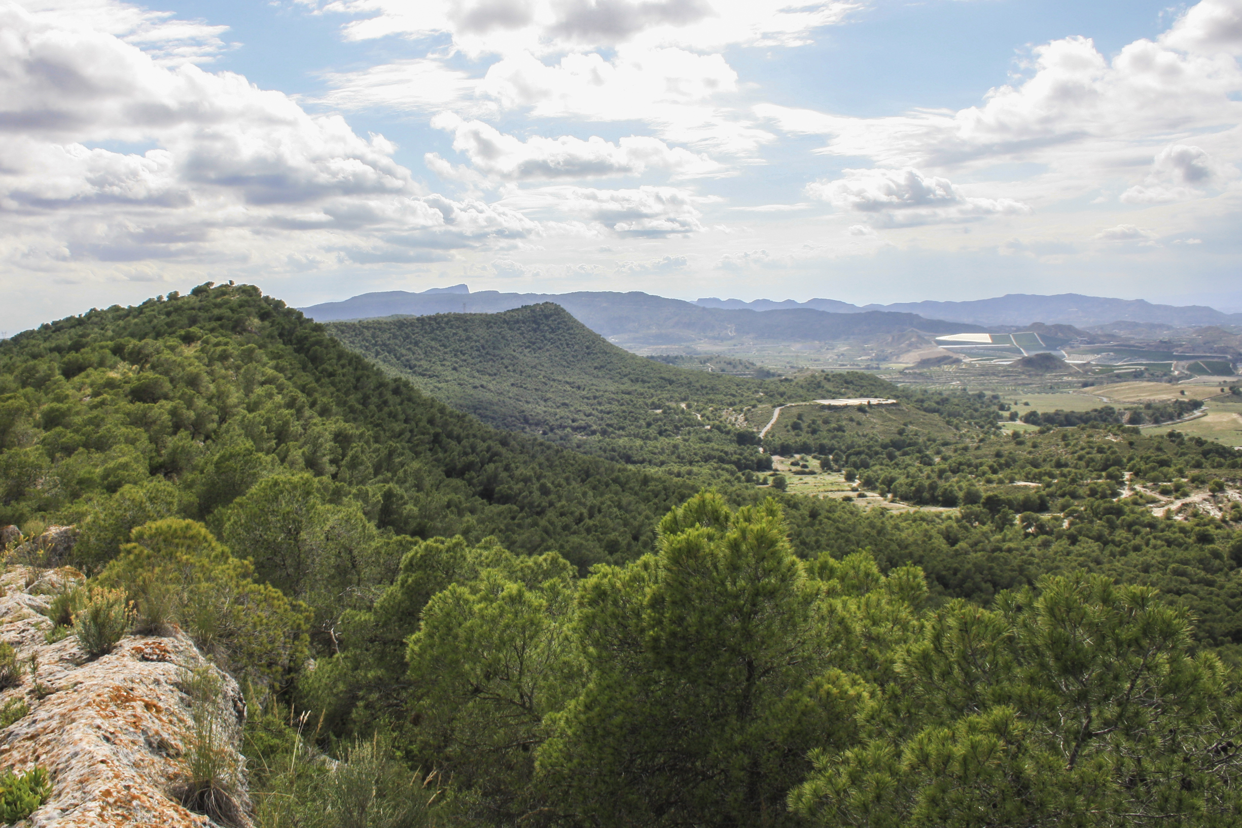 Sierra de Escalona y Dehesa de Campoamor This is a photography of a Site of Community Importance in Spain with the ID: ES5212012. Natura2000 entry, EEA entry